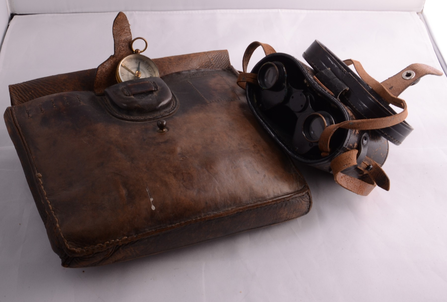 Walter Naumann wurde 1888 in Böhlitz-Ehrenberg geboren und war 1914 bis 1918 Meldegänger des Königlich Sächsischen 6. Infanterieregiment Nr. 105 „König Wilhelm II. von Württemberg“, das an den Schlachten von Verdun und Cambrai teilnahm. Nach der Schule war Naumann in Restaurants in Grenoble und Atlantic City (USA) in die Lehre gegangen, da sein Vater ein eigenes Restaurant in Bad Düben besaß und Walter dieses übernehmen sollte. Kurz vor Ausbruch des 1. Weltkrieges kam Walter aus Atlantic City zurück, wohin er auswandern wollte. Zu seinen Hinterlassenschaften aus den Kriegsjahren 1914-1918 gehört ein Koffer, in dem sich eine Meldegängertasche samt Inhalt befand. Der Koffer enthielt dazu noch eine Reihe von Tagebüchern, Fotos und vier genau beschrifteten Fotonegativalben mit über 400 Mittelformat Negativen. Naumann war ein begeisterter Fotograf und besaß immer die neueste Technik. Möglicherweise stammte seine Feldkamera aus den USA. Mittels der Tagebücher und der genauen Fotodokumentation kann die gesamte Zeit seines Kriegseinsatzes nachgezeichnet werden: Von seiner Mobilmachung am 11. September 1914, dem Transport über Leipzig und Köln nach Lüttich in Belgien. Von dort ging es an die Front bei Laon in Frankreich, über verschiedene Zwischenstationen in Frankreich, bis zum Rückzug am 6.11.1918 von Happencourt über Baives/Frankreich und Lüttich bis zur Ankunft in Böhlitz.